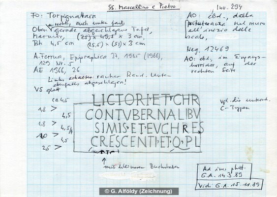 HD015020